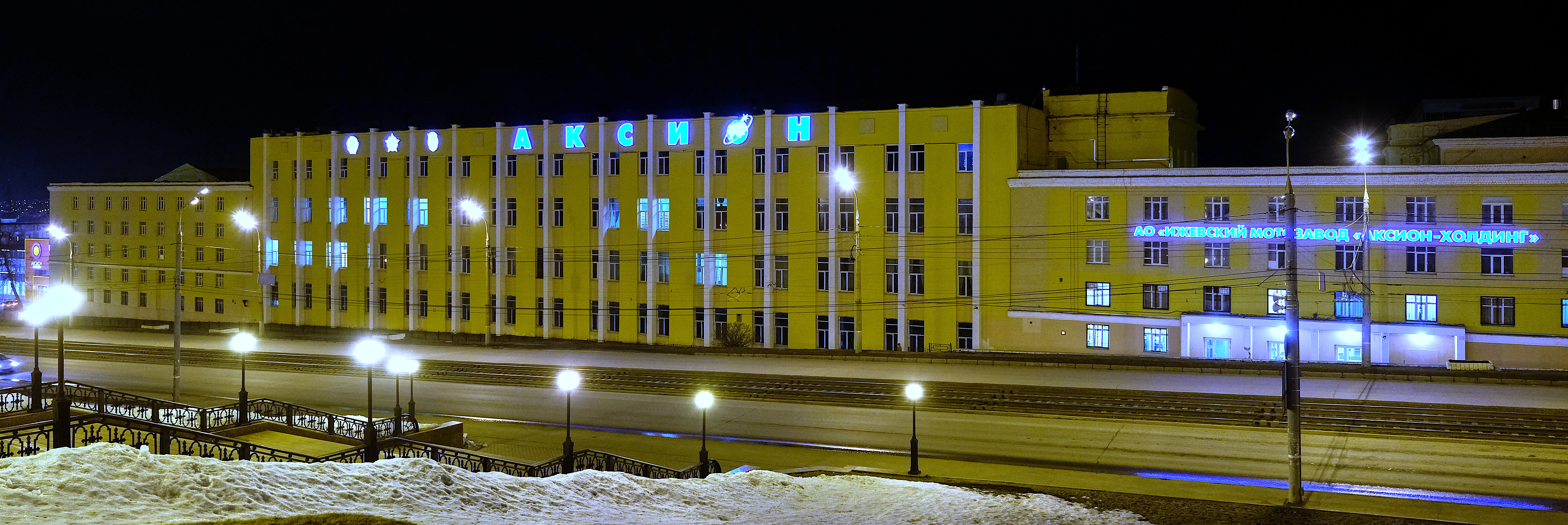 Ижевский мотозавод Аксион-холдинг